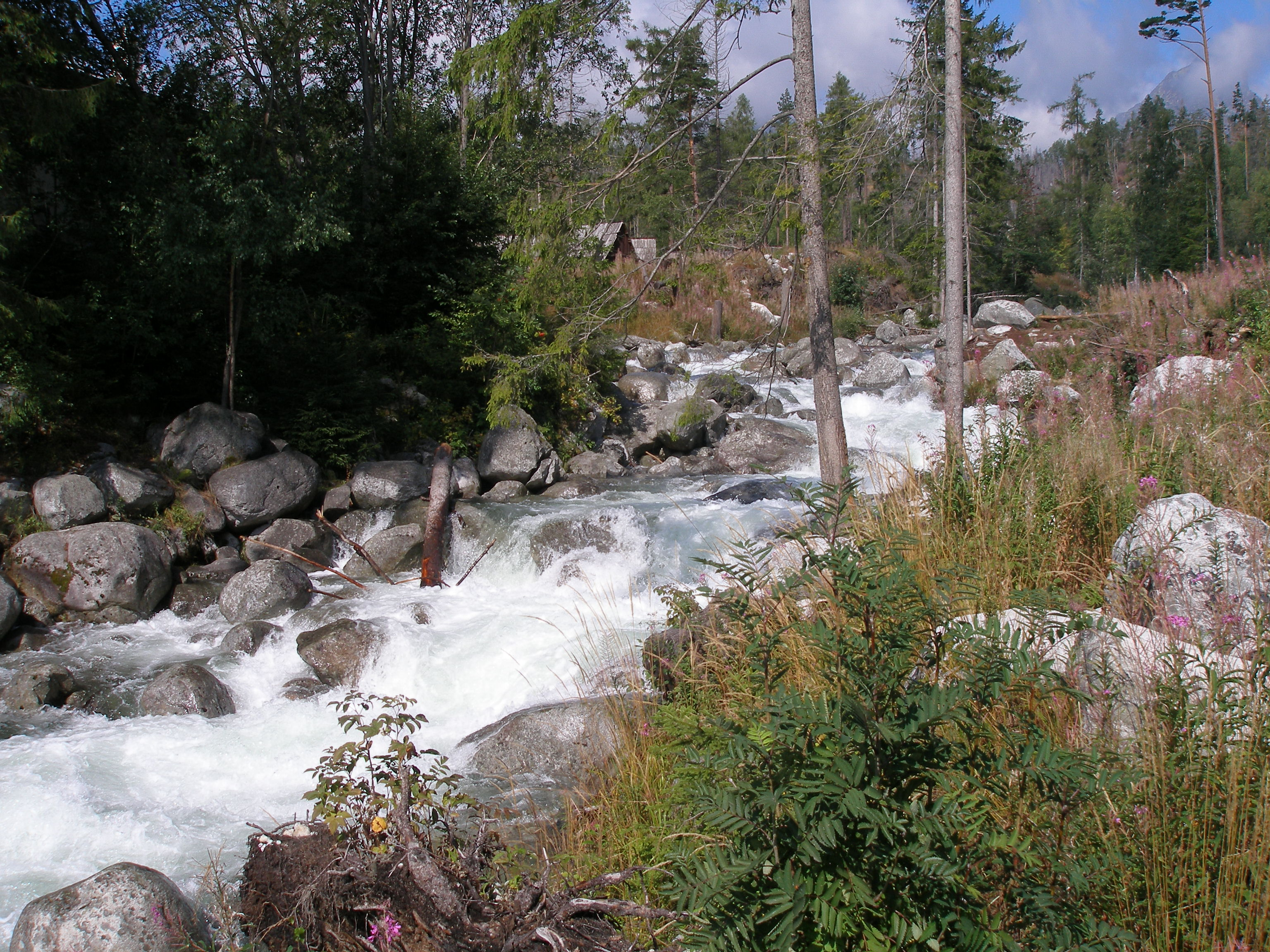 Okolie osady Tatranská Lesná